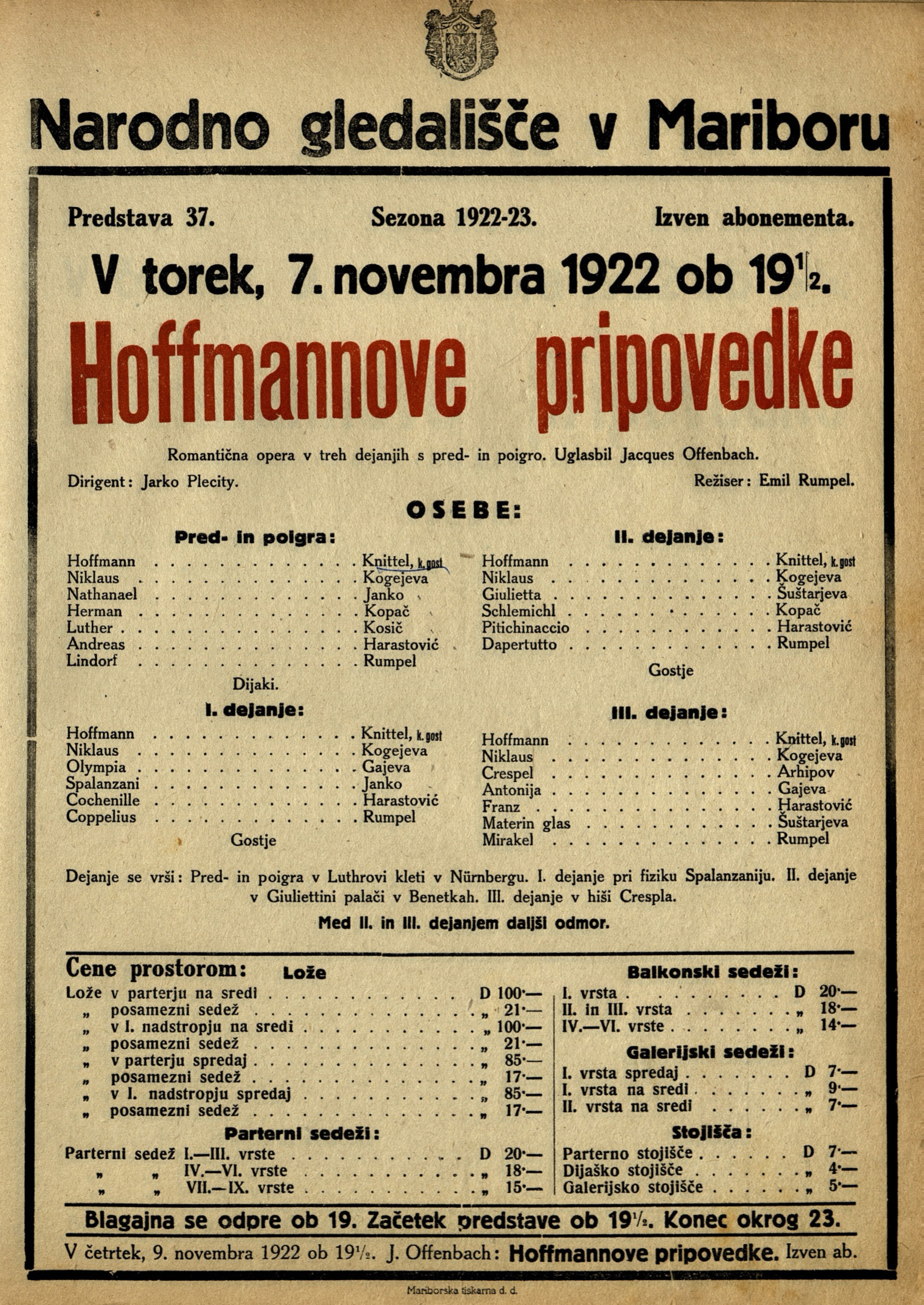 Plakat za predstavo Hoffmannove pripovedke v Narodnem gledališču v Mariboru.